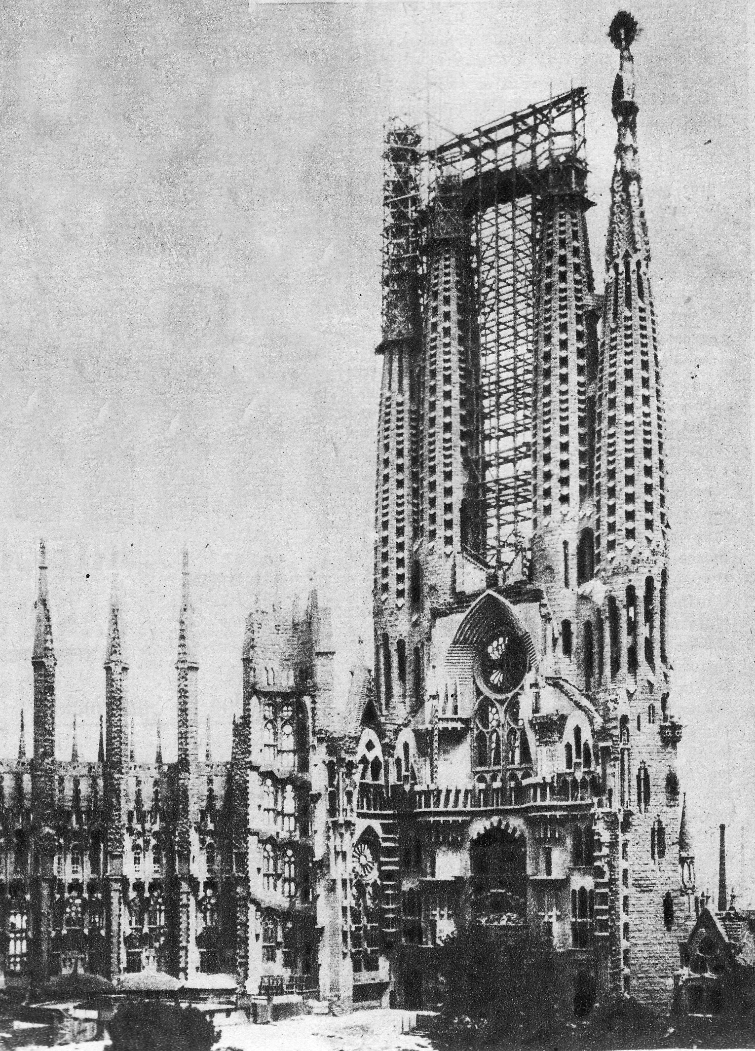 Sagrada Família. Estat de la construcció el 1929